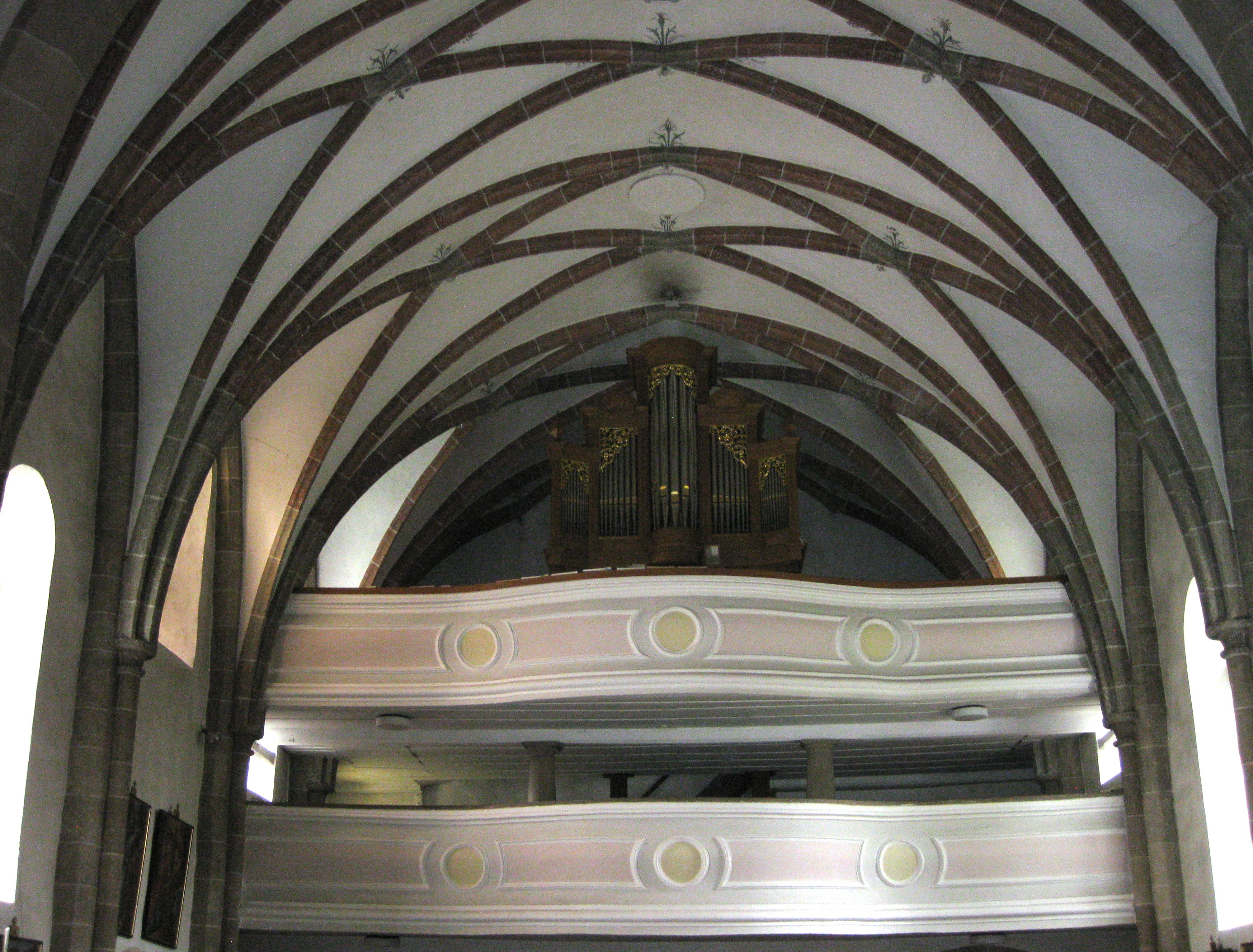 Neue Orgel (1991, Metzler, Zürich)